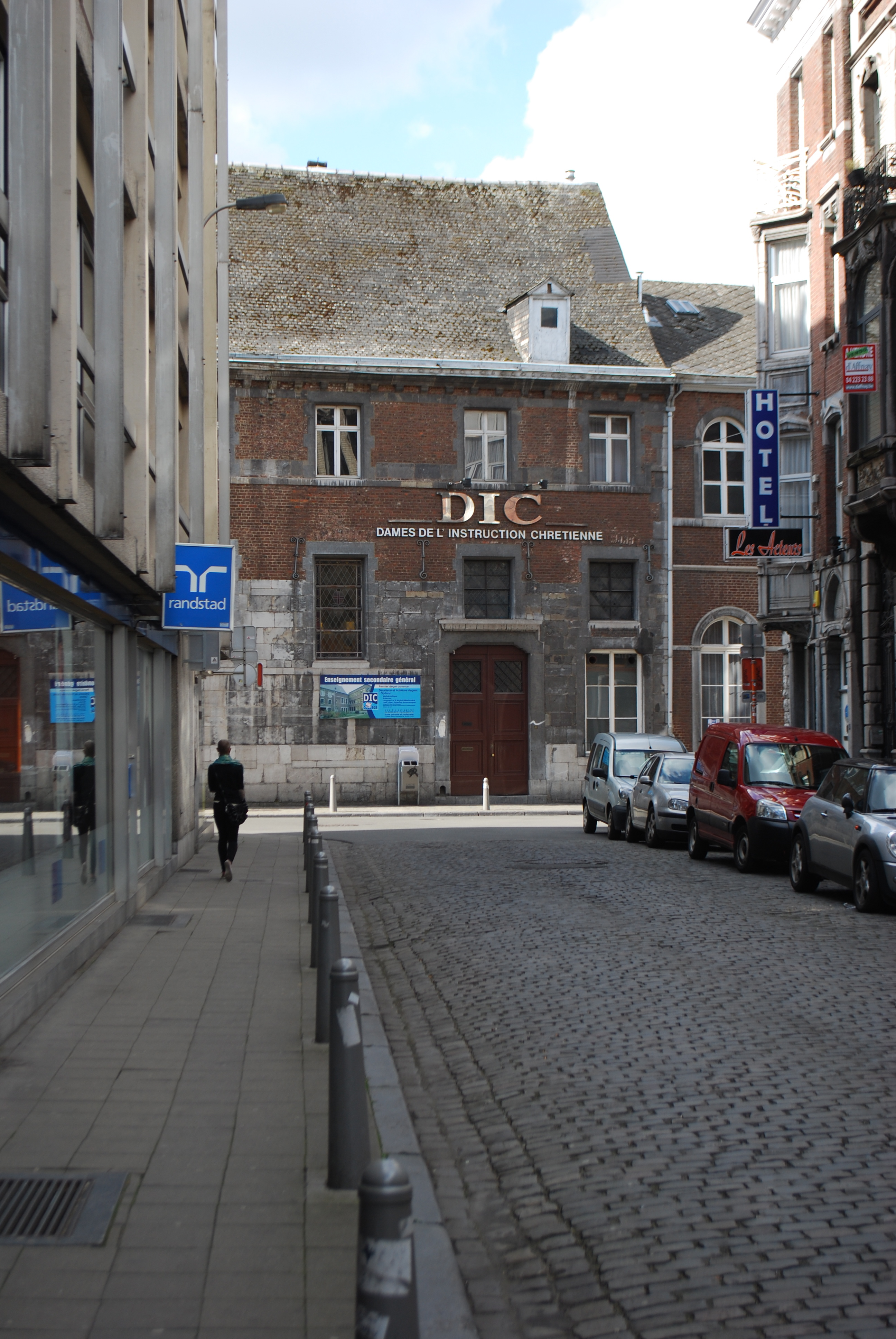 Vue du Collège des Dames de l'Instruction Chrétienne (DIC Collège) à Liège.